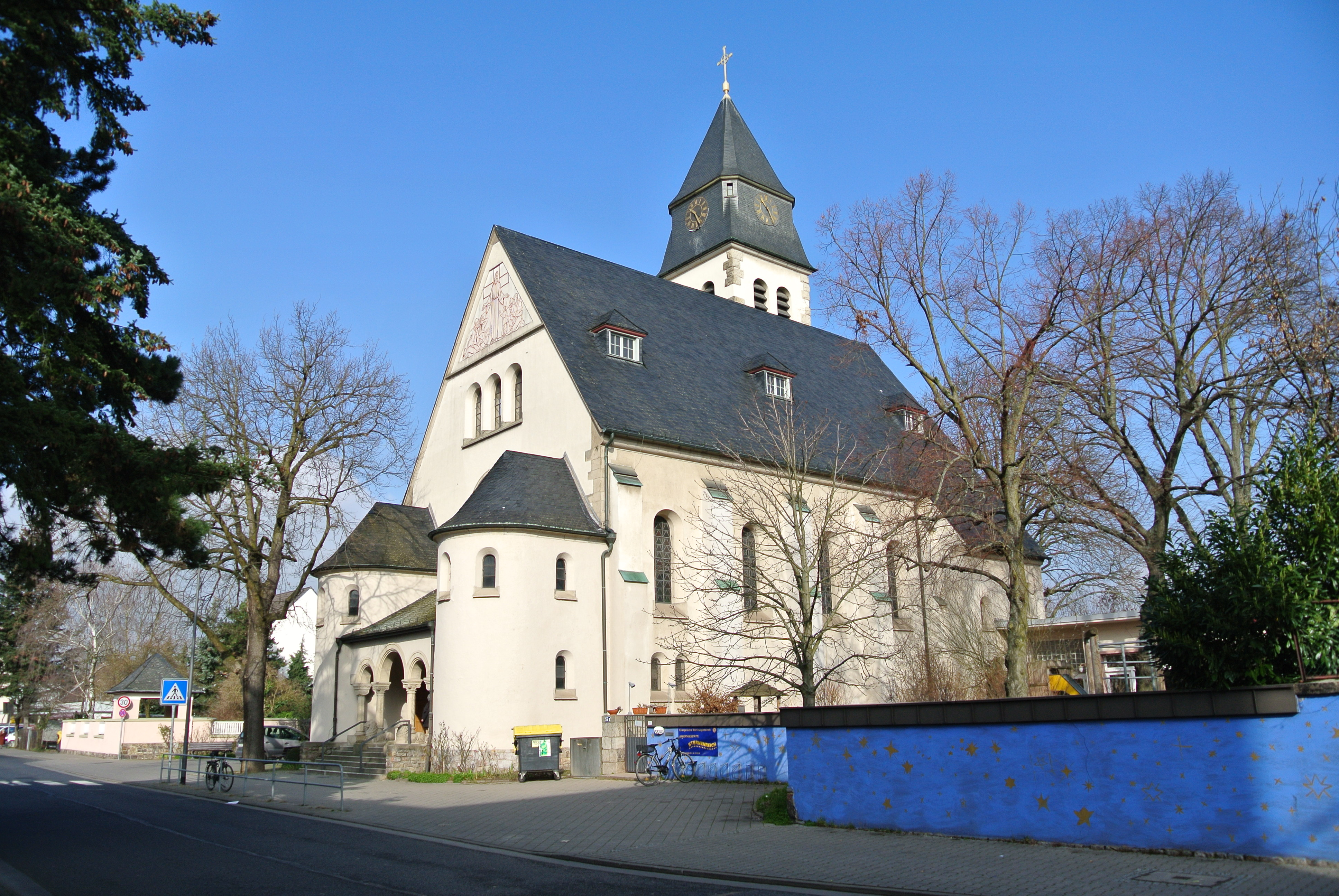 Evangelische Martinuskirche in Frankfurt-Schwanheim, 1911, neoromanische Kirche von Otto Bäppler; Baudenkmal, Südostansicht